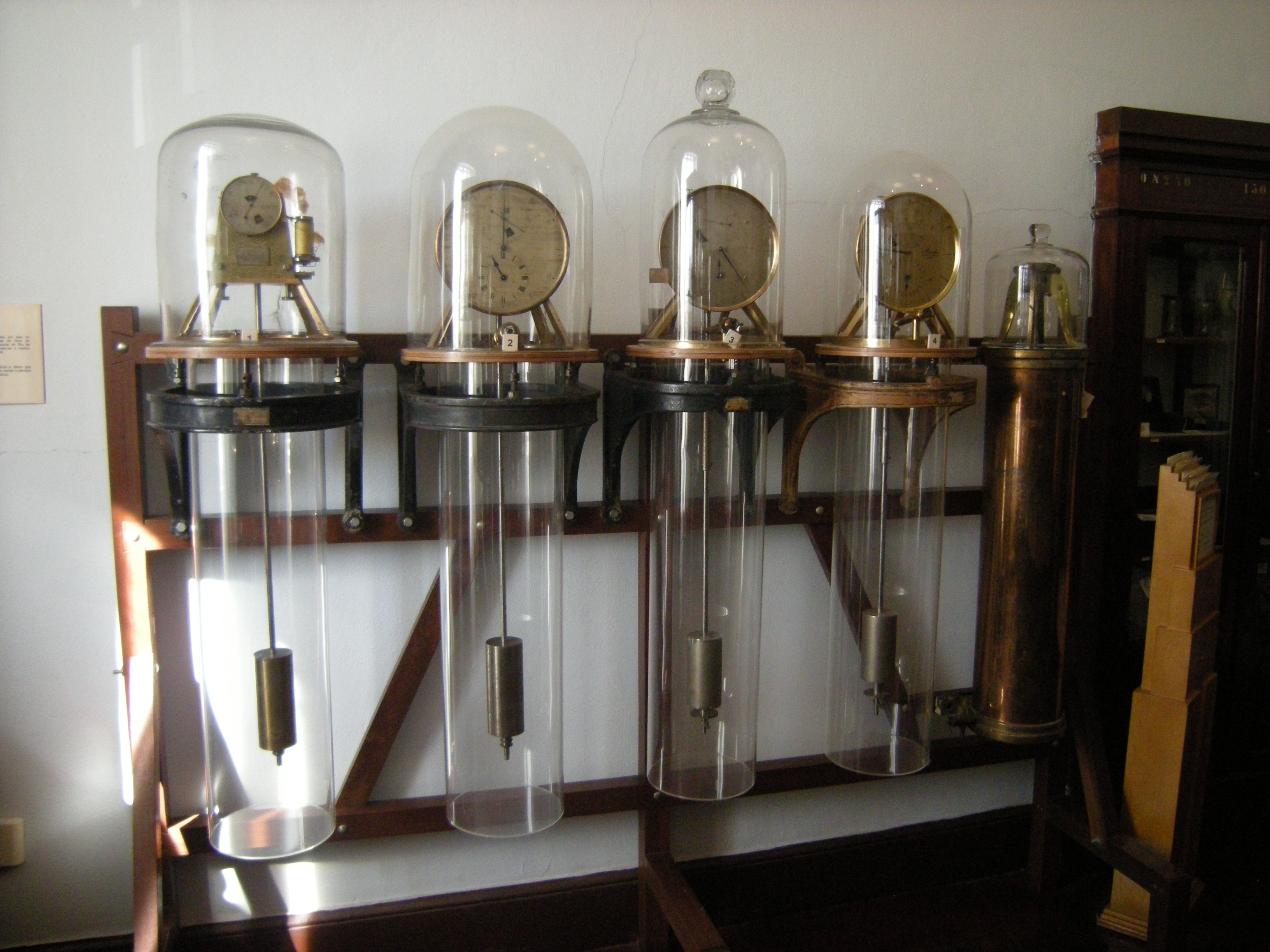 Experiências temporais "in vitro"